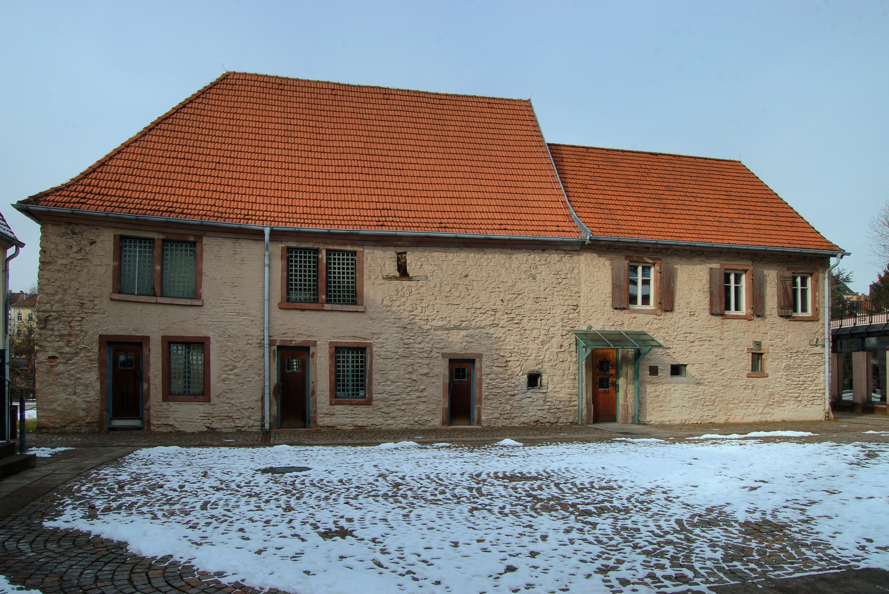 Eines der historischen Salzhäuser in Sulzbach